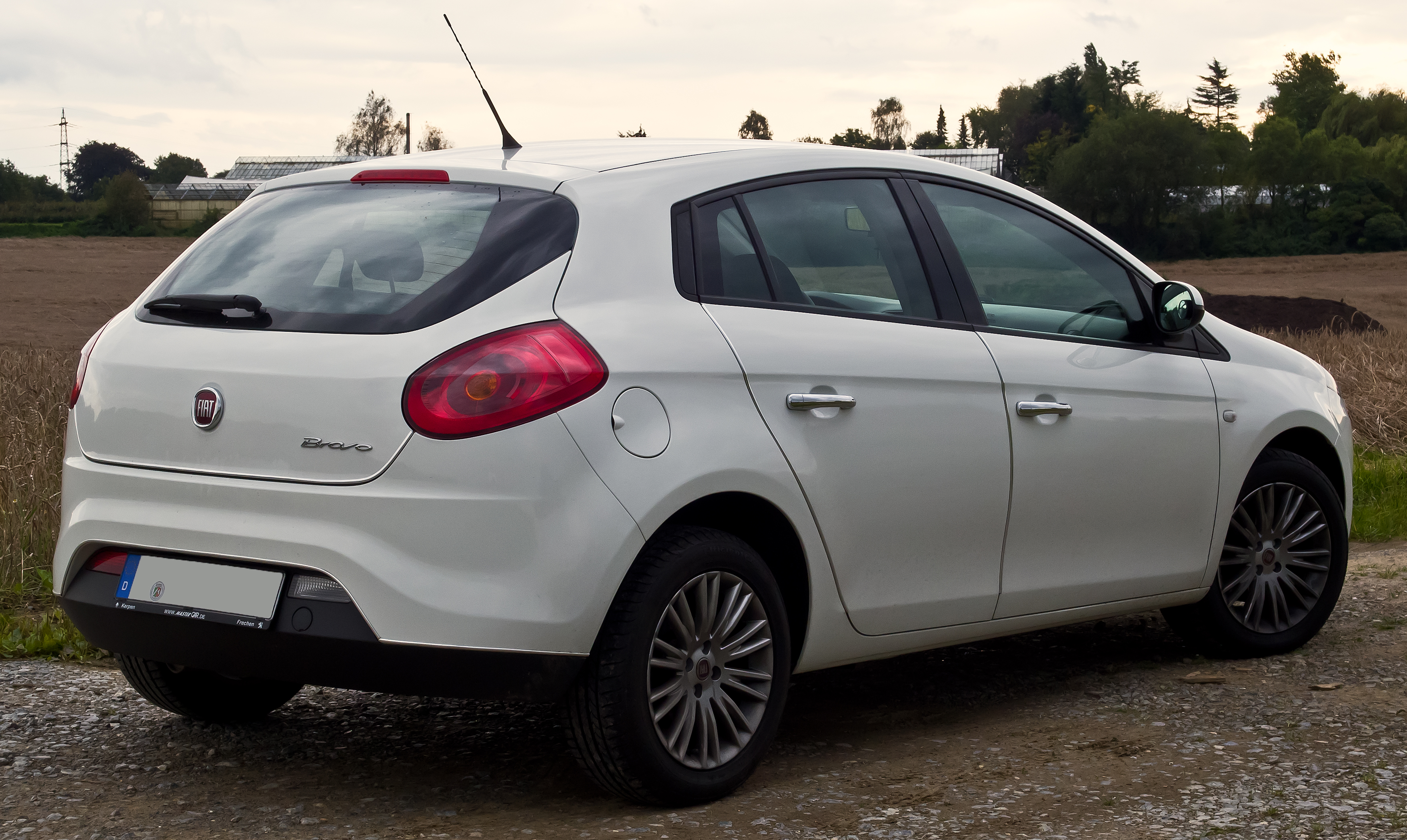 Fiat Bravo 1.6 16V Multijet Dynamic (II)